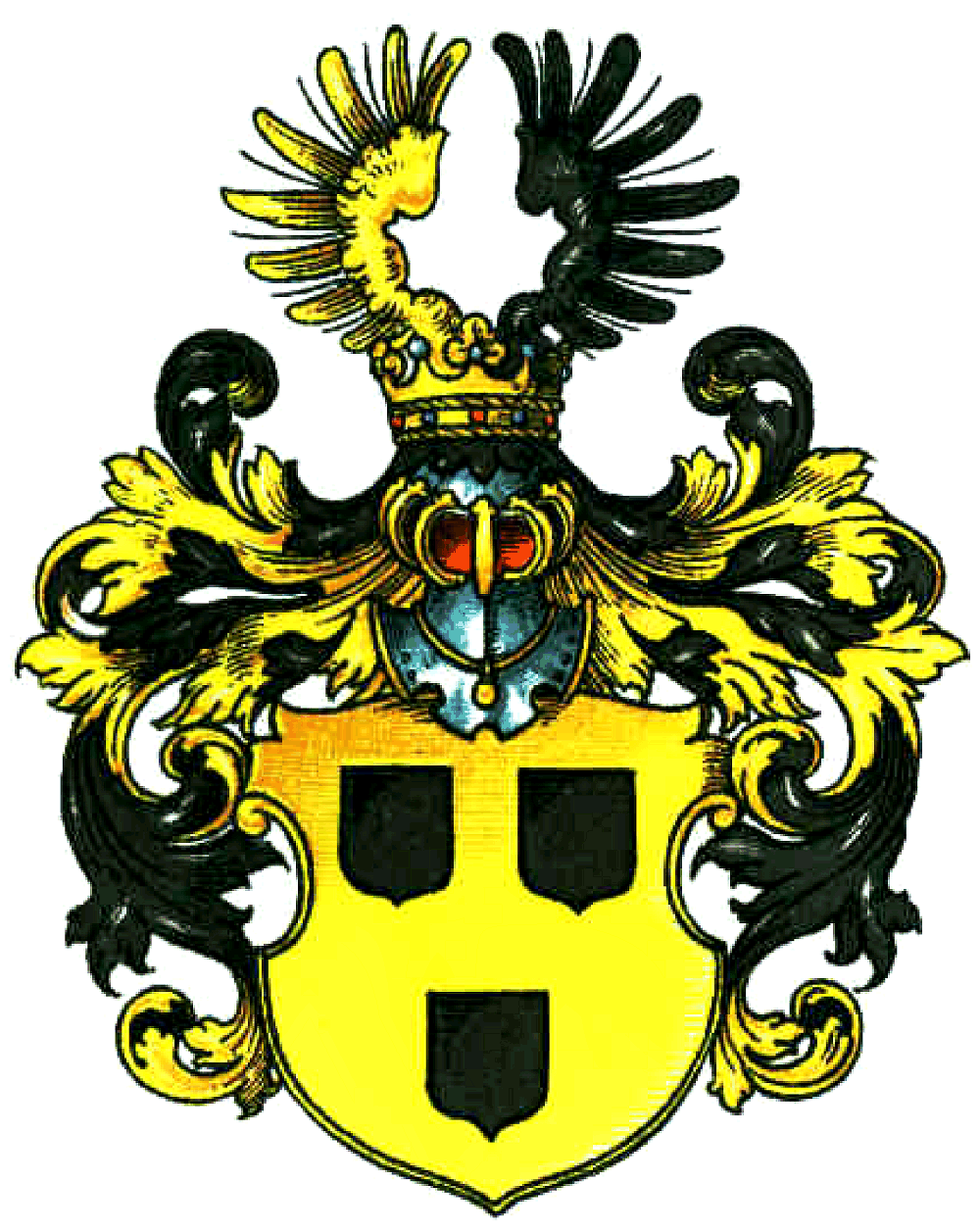 Wappen derer von Löbbecke